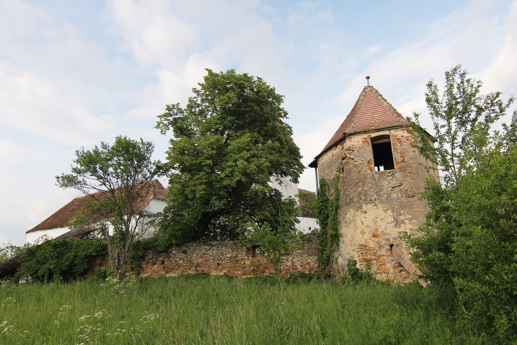 Hosman: Incintă fortificată exterioară, cu două turnuri 03